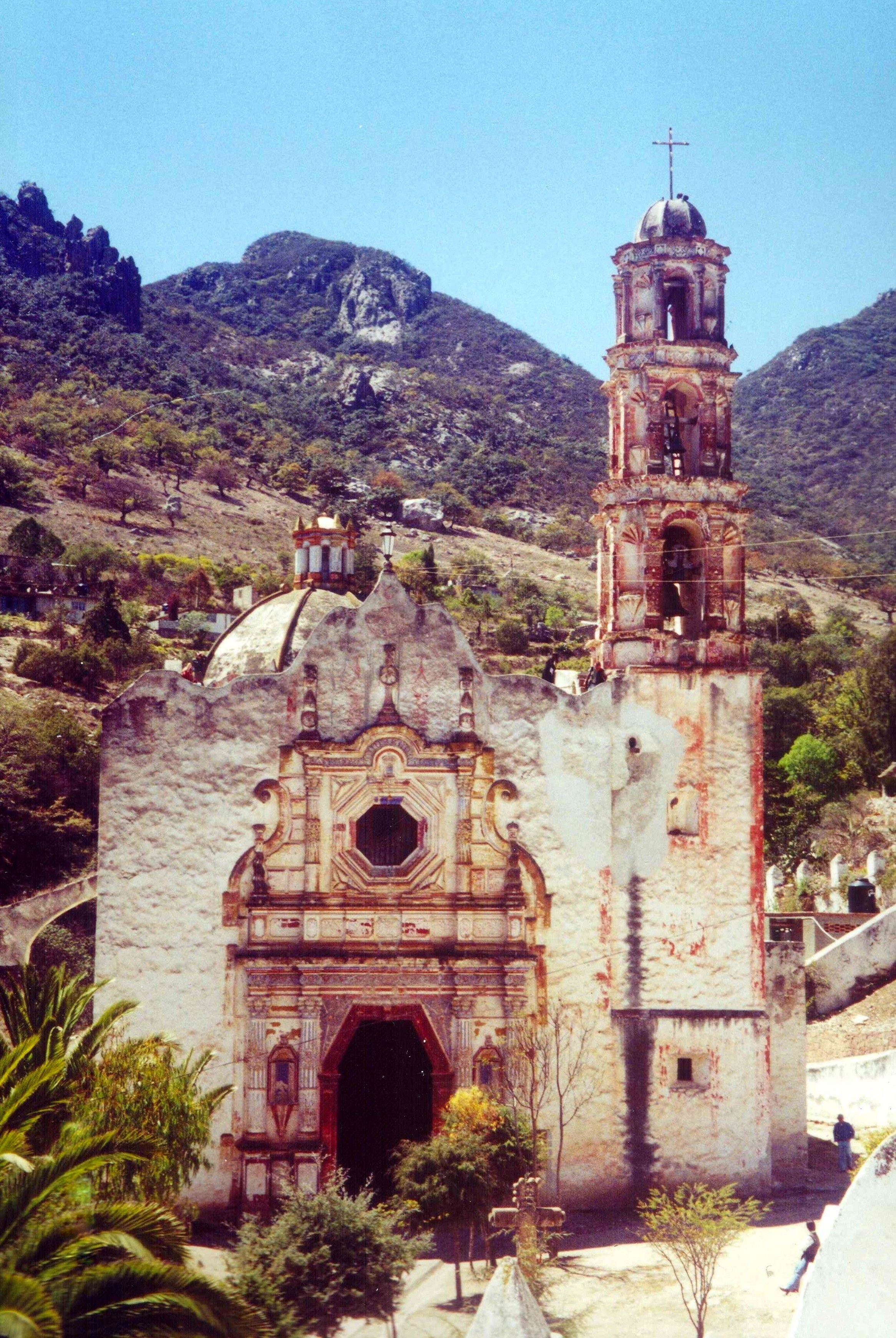 Templo de la Cruz de Santa Teresa en Cardonal, Hidalgo